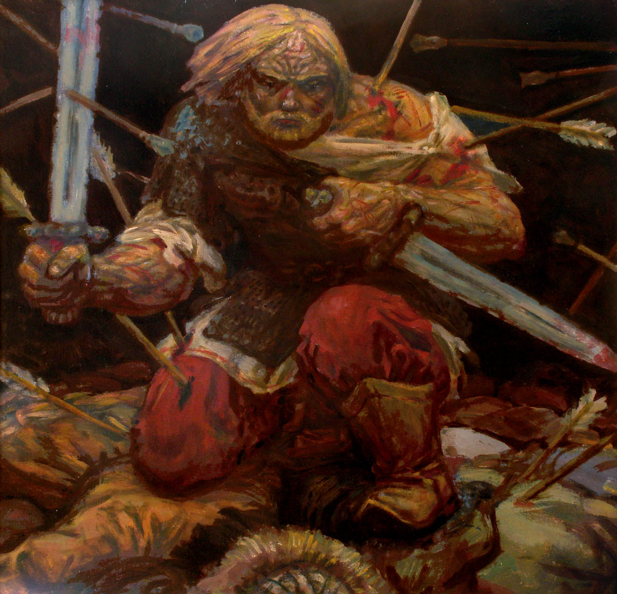 Легендарный герой времён Батыева нашествия